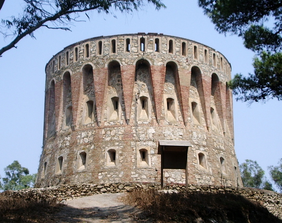 Fort on Ceuta